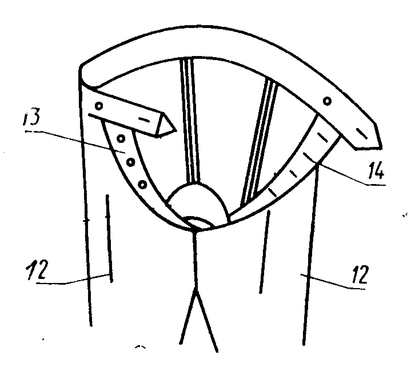 Изображение из ГОСТ 22977-89 (СТ СЭВ 6484-88) — Детали швейных изделий. Термины и определения.